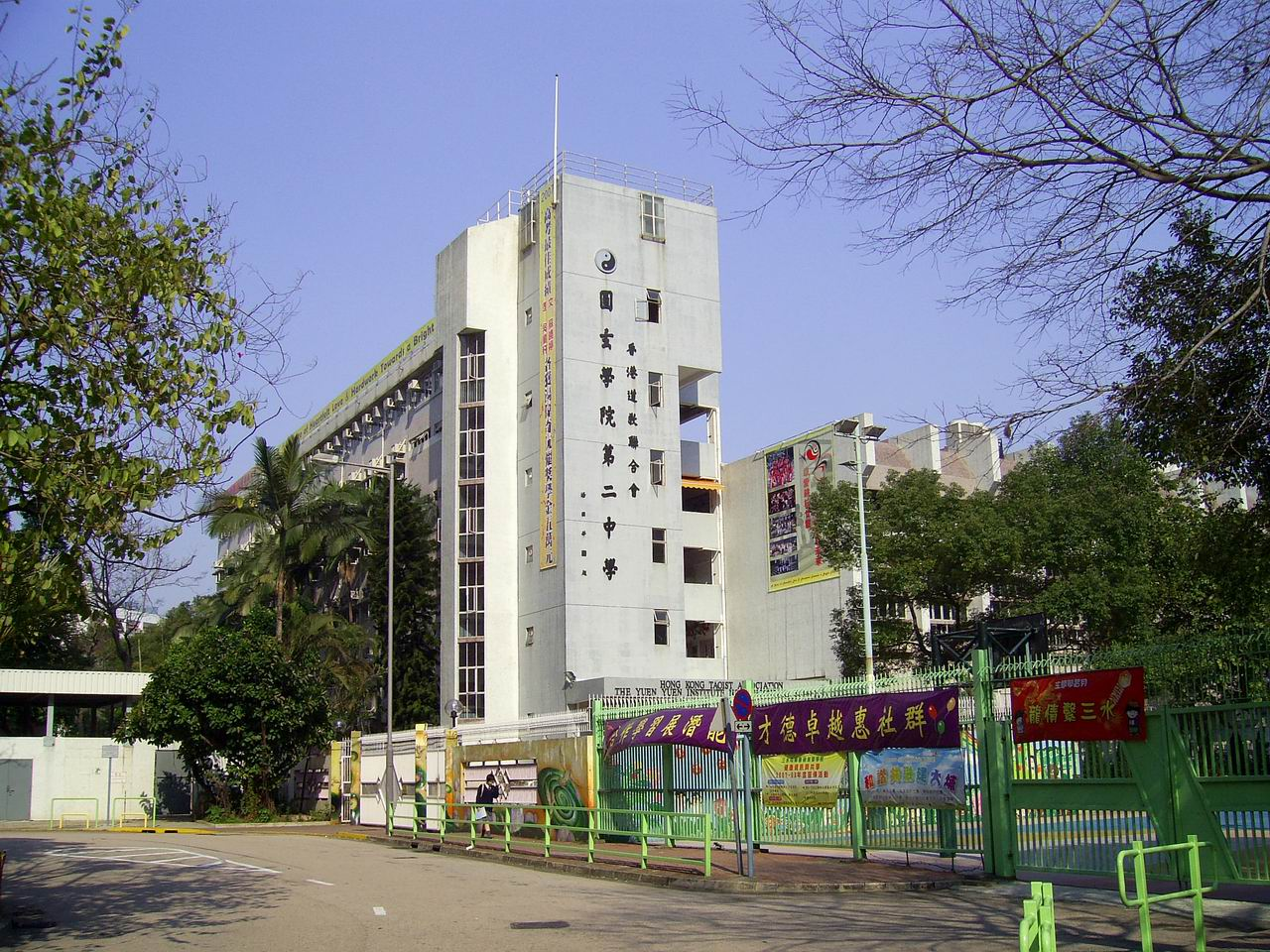 中文（香港）: 圓玄學院第二中學